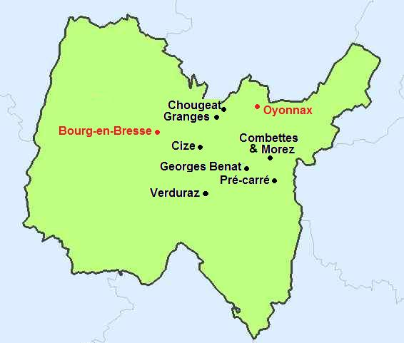 Carte de localisation des différents camps du maquis de l'Ain au début de l'année 1944